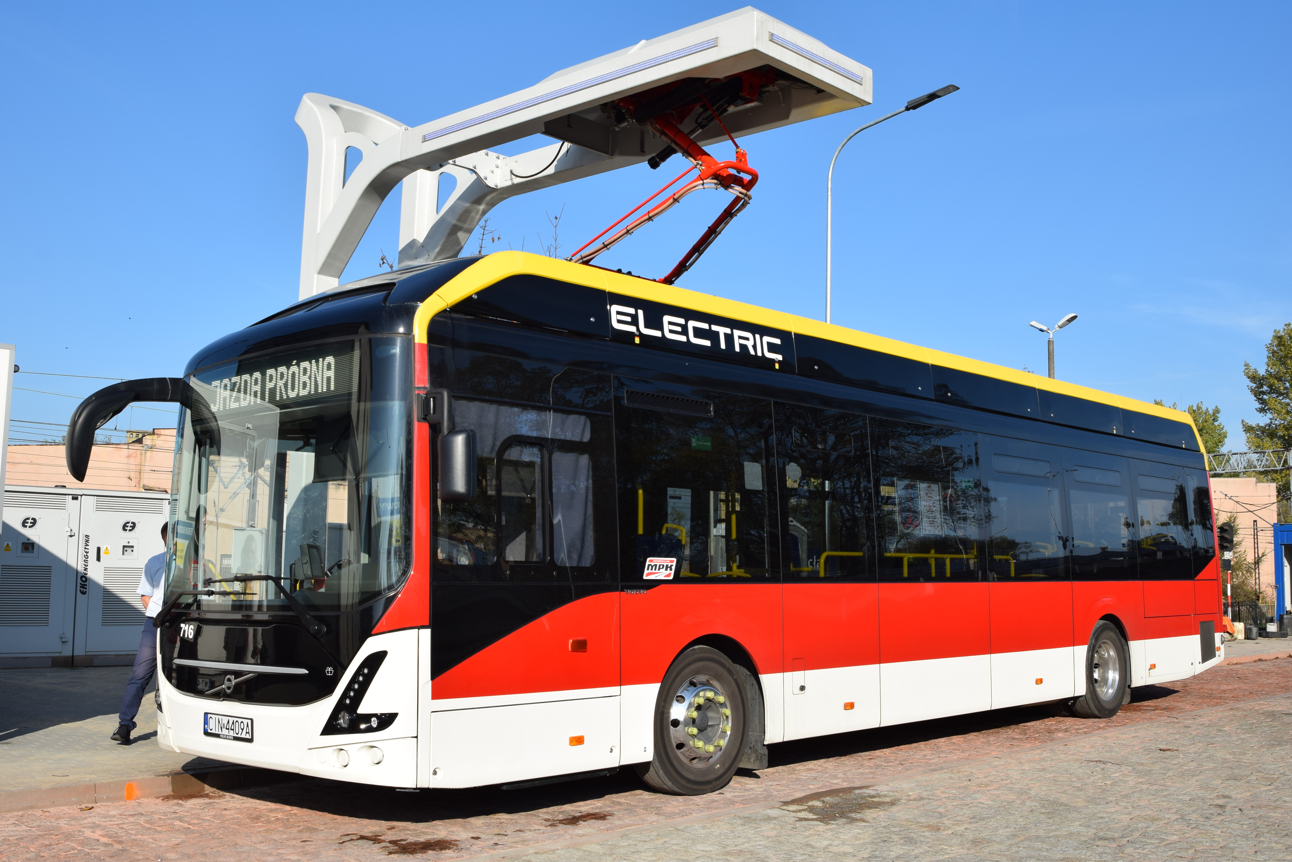 Autobus MPK Inowrocław podczas ładownia za pomocą pantografu zlokalizowanego przy dworcu PKP.